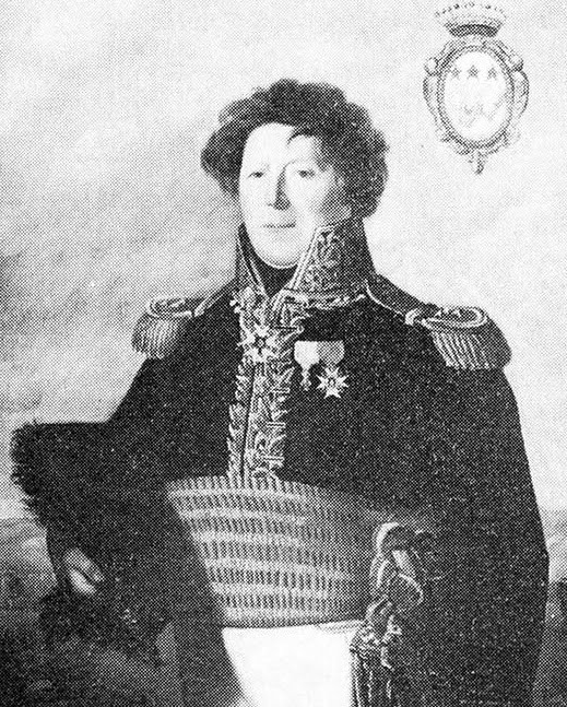 Joseph Chabran (1763-1843), général de division de la Révolution et de l'Empire.